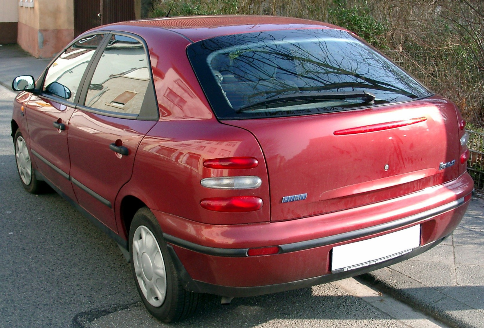 Fiat Brava, Baujahr 1996